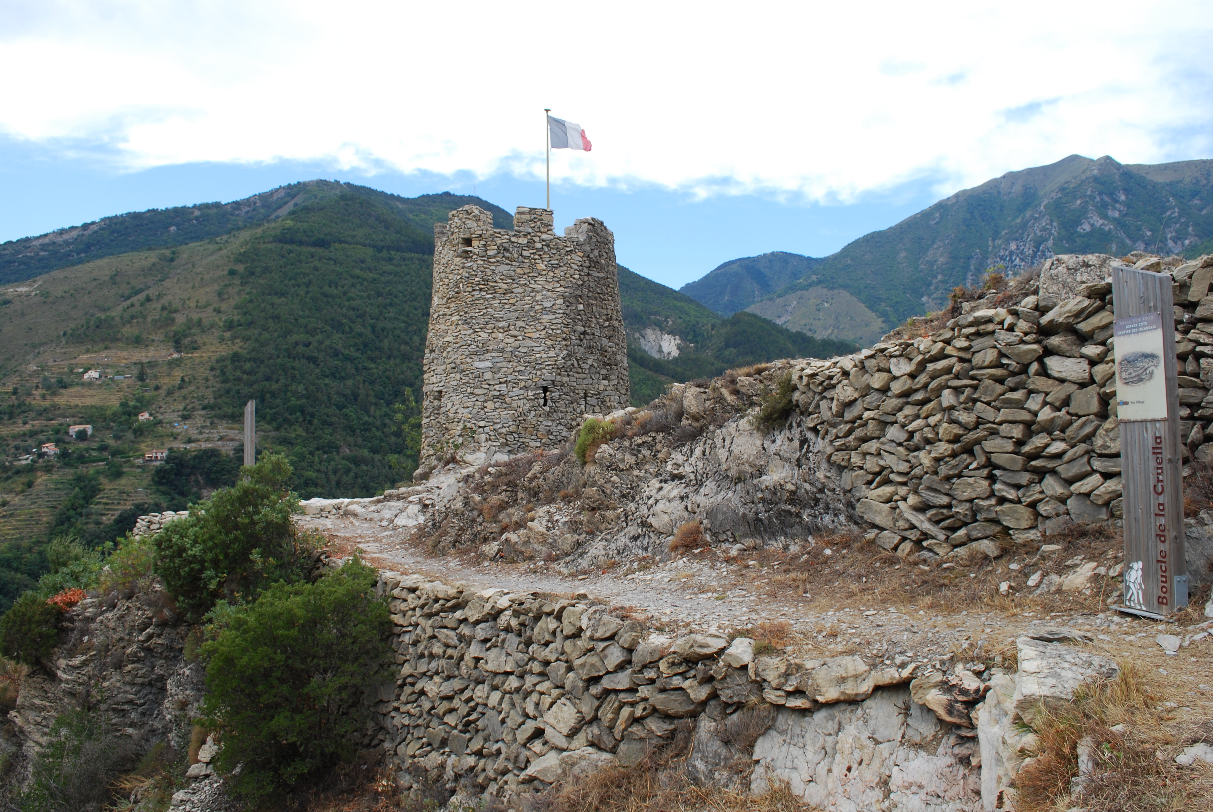 Tour de la Cruella, à Breil-sur-Roya, Alpes-Maritimes, France (photo prise par dsch67).